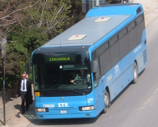 autore:Luigi Capozzi descrizione: autobus della STP Bari a Canosa di Puglia, Panoramica anno:2008